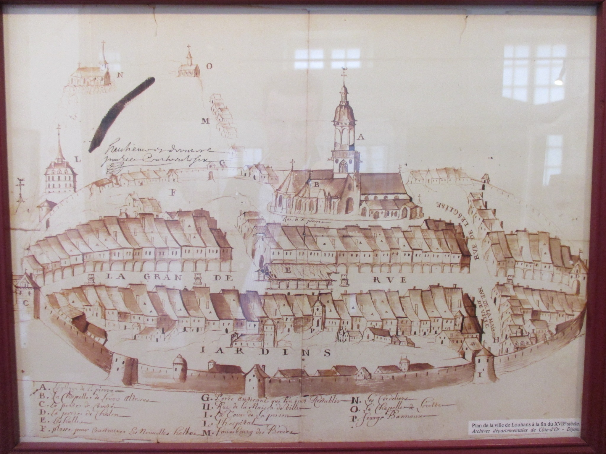 Écomusée de la Bresse bourguignonne : Louhans, son église Saint-Pierre à dôme et ses 157 arcades au XVIIe siècle